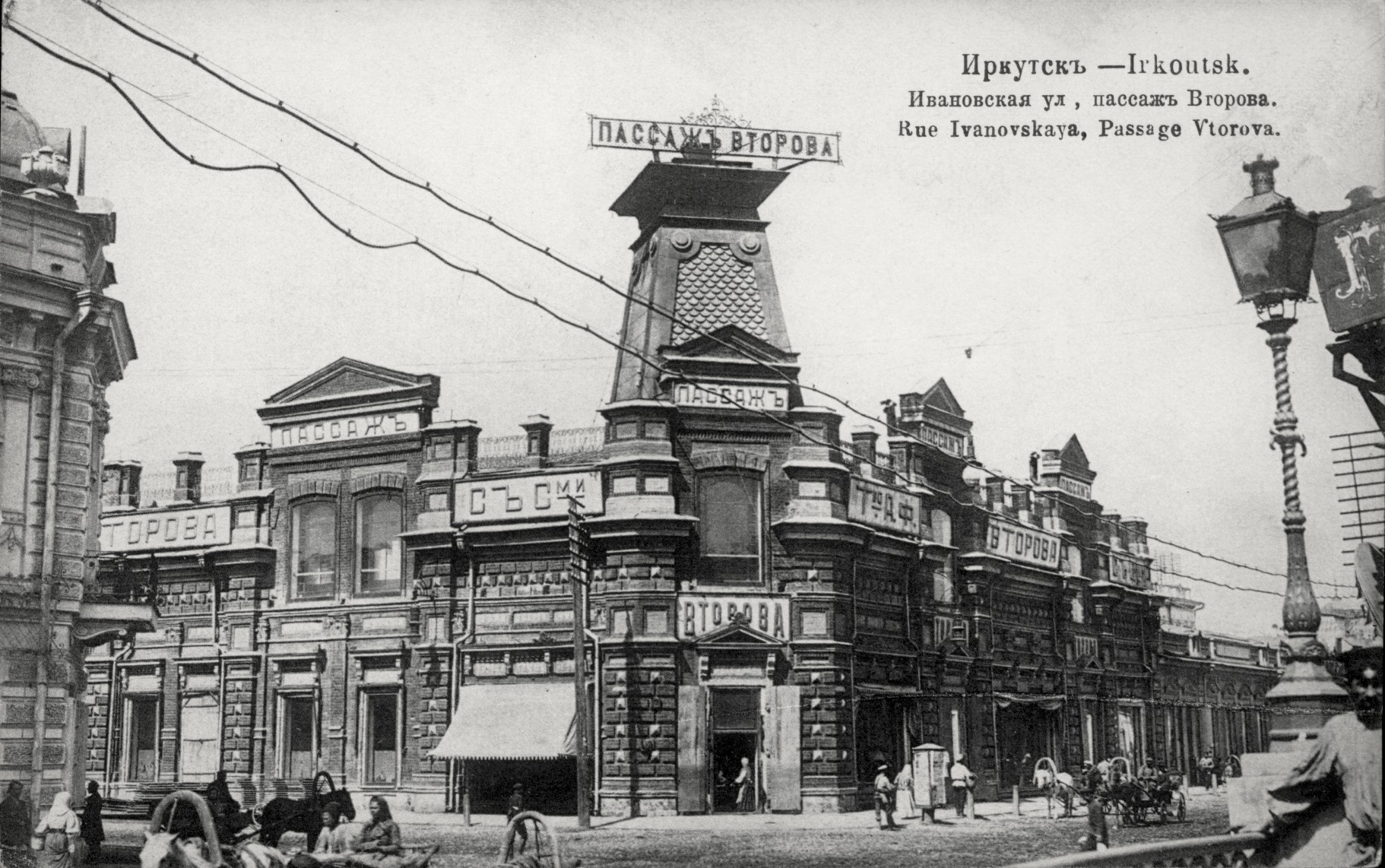 Пассаж А. Ф. Второва в городе Иркутск, 1900 год.